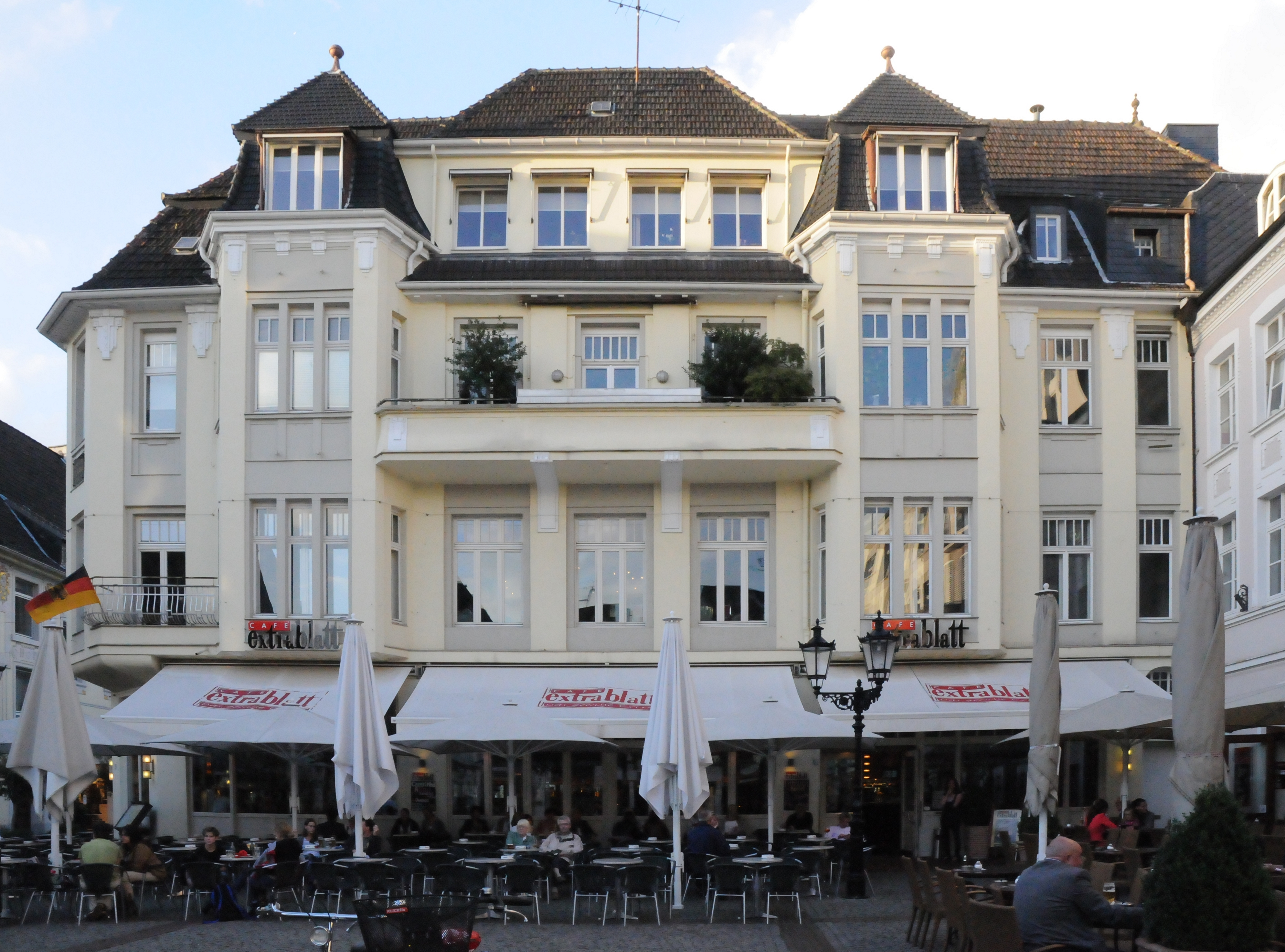 Moers, Altmark 1, Denkmal Nr. 76